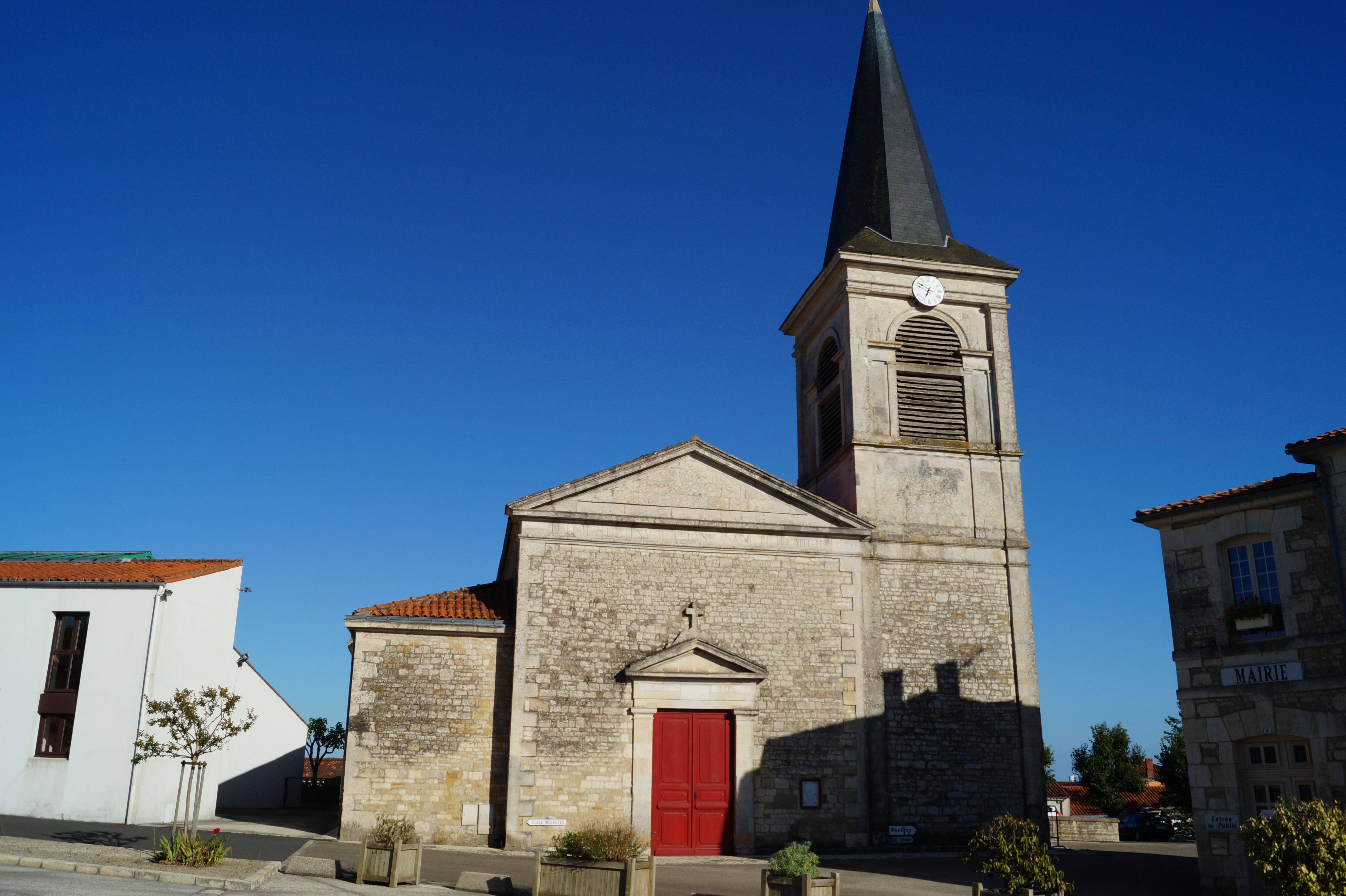 L’église Saint-Remi de Pissotte.